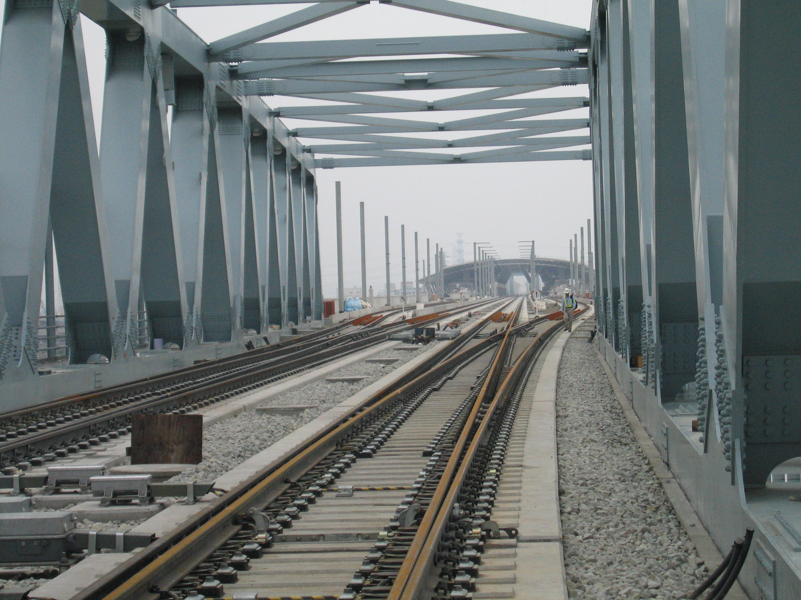 Bahnhofseinfahrt Taishung Station (im Bau April 2005)